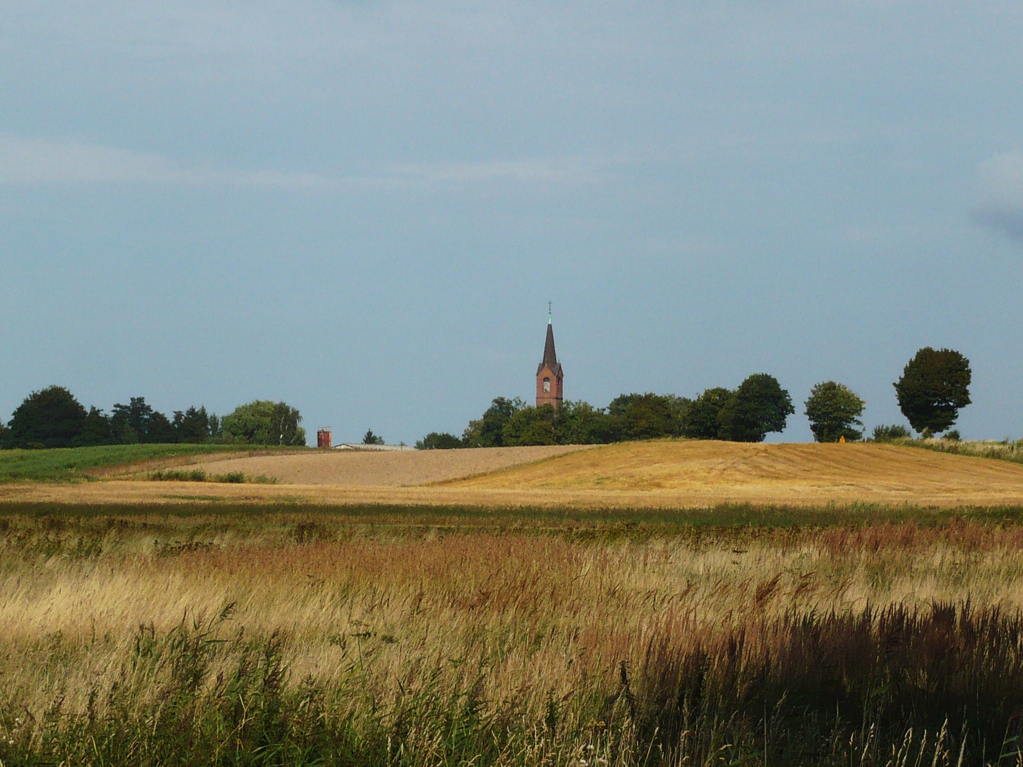 Korzystno, kościół